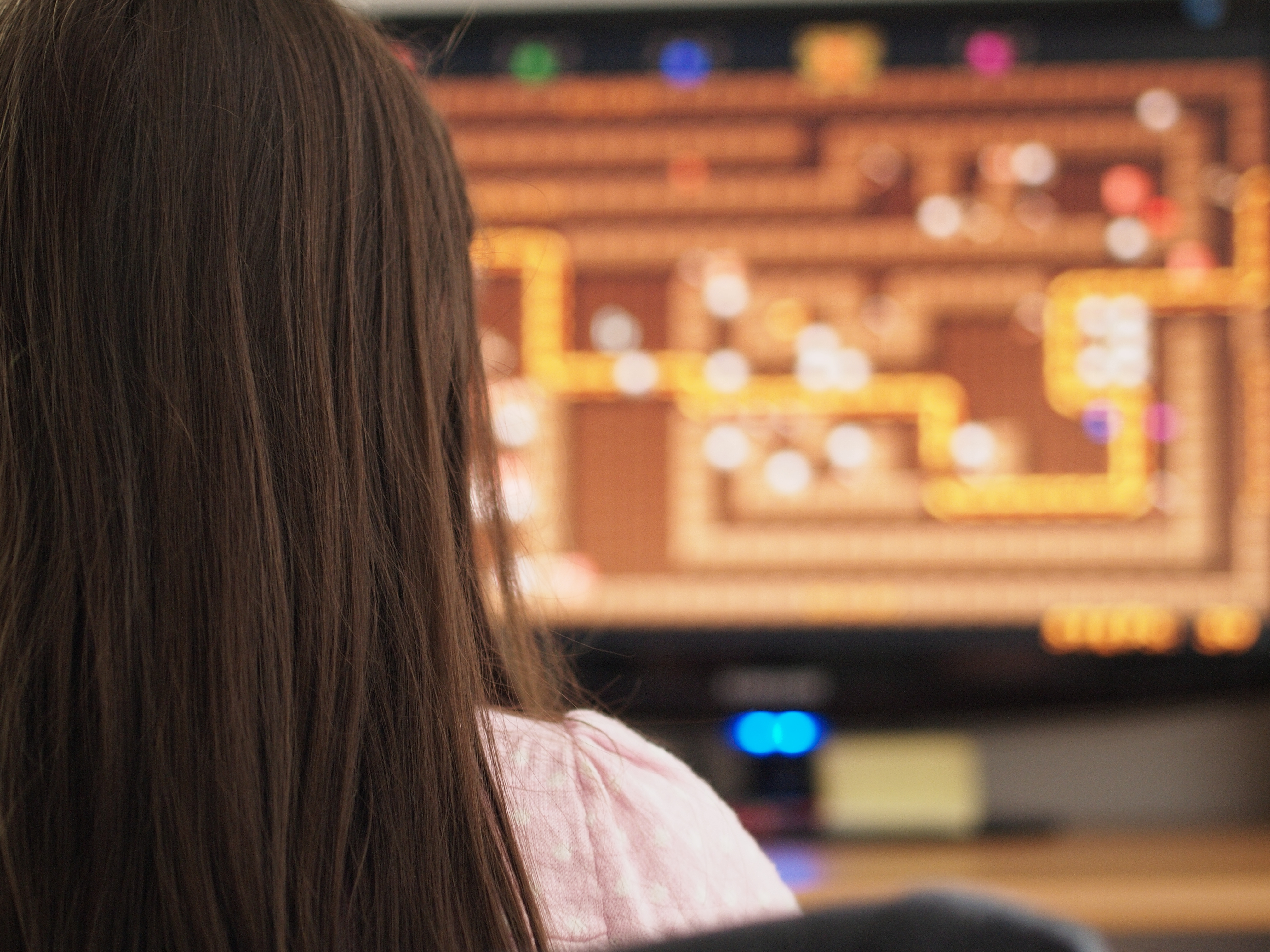 Rysunek przedstawiający dziecko korzystające z gry komputerowej (najlepiej o charakterze edukacyjnym) English | Polski | +/−